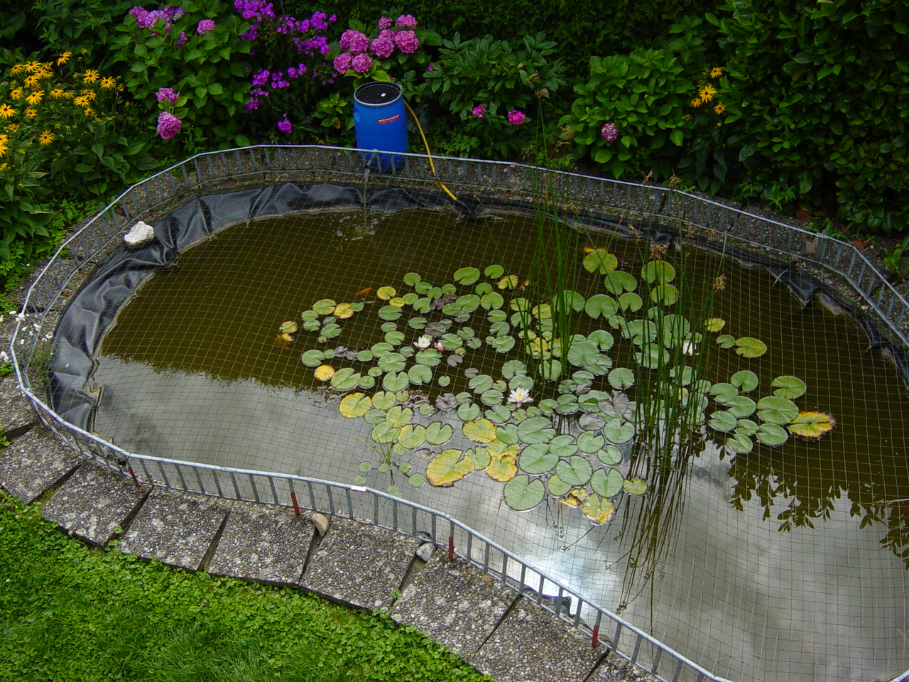 omas garten Source: selbst geschossen